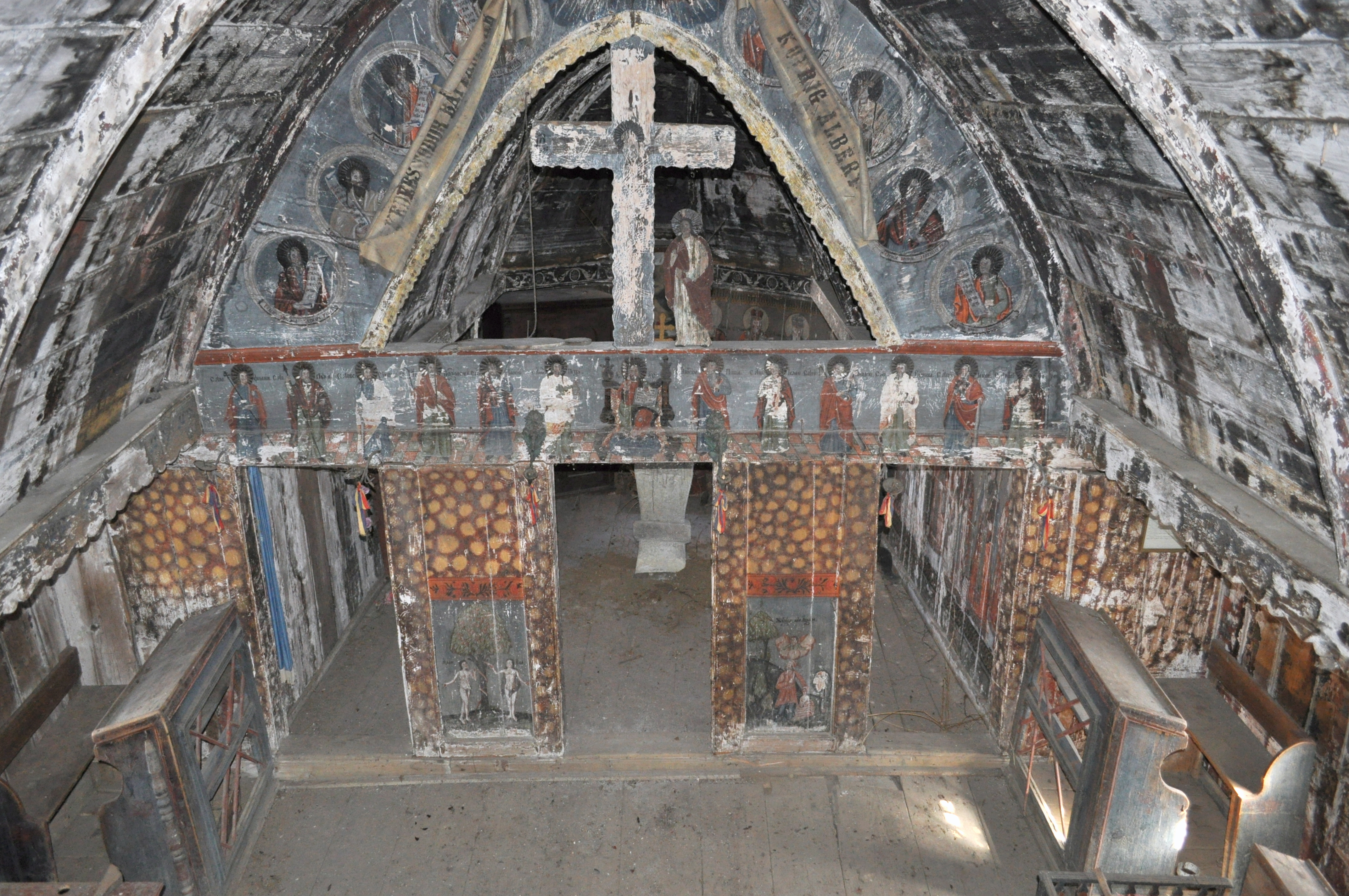 Biserica de lemn din Silivaș, județul Cluj